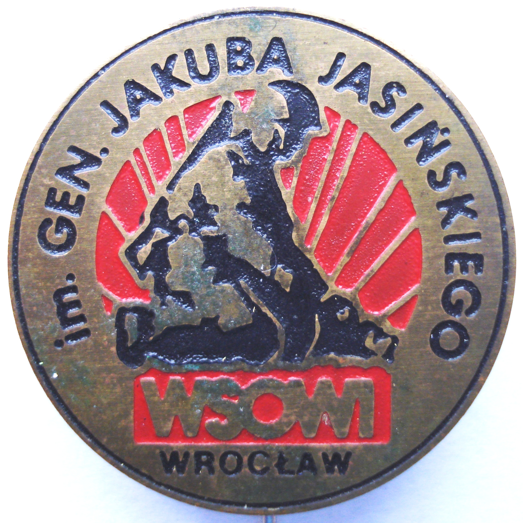 Odznaka okolicznościowa Wyższej Szkoły Oficerskiej Wojsk Inżynieryjnych im. gen. Jakuba Jasińskiego we Wrocławiu. Autor projektu odznaki nieznany.